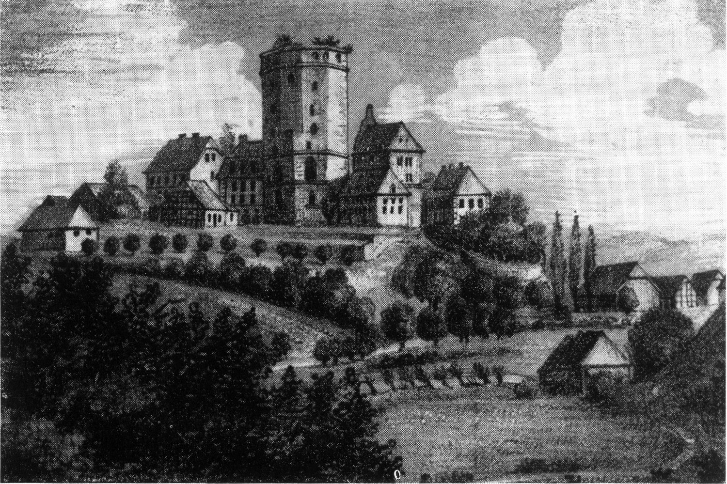 Burg Adelebsen